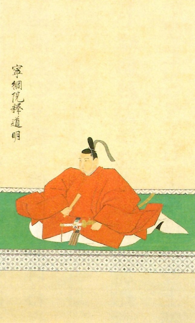 渡辺寧綱の肖像。